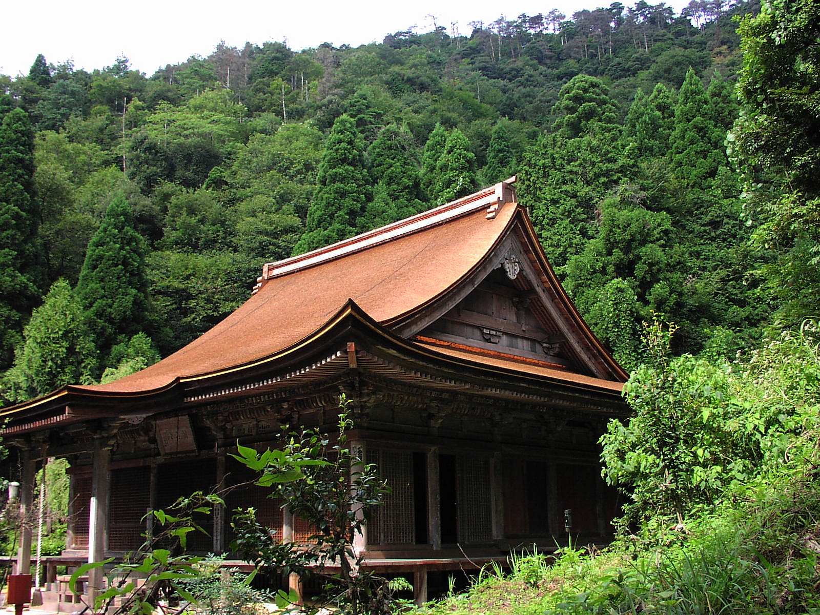 福井県小浜市の羽賀寺